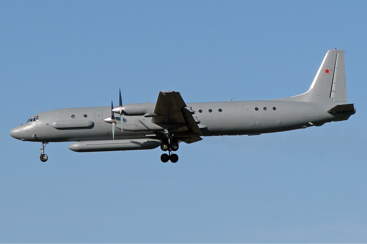 Ил-20М на аэродромом Чкаловский.